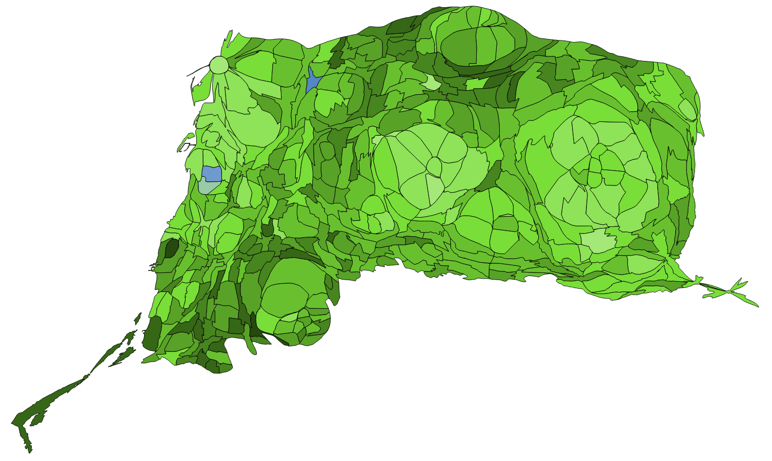 中文（台灣）: 顏色對照表